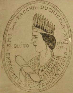 Sello con la efigie de Paccha Ducicela, Shyri XVI (circa 1930).